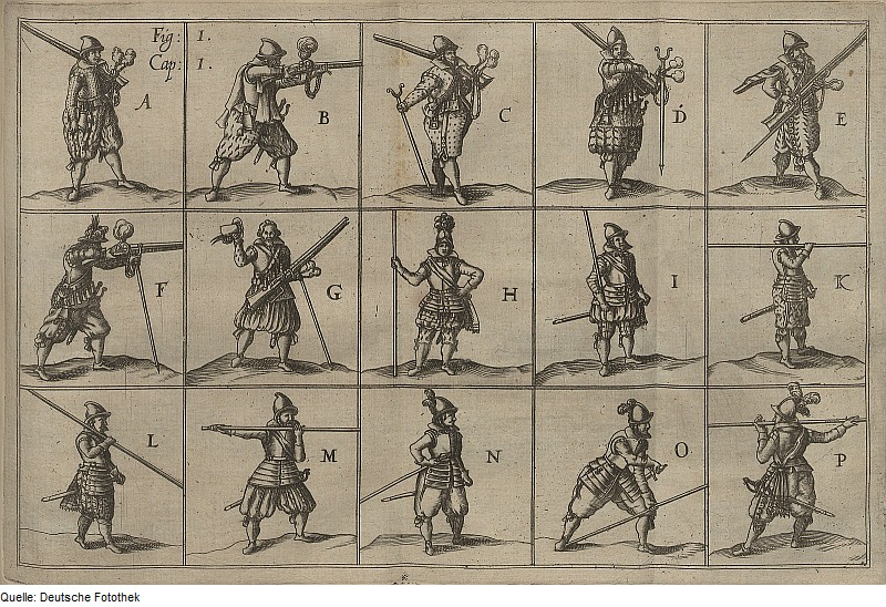 Original image description from the Deutsche Fotothek Kriegskunst